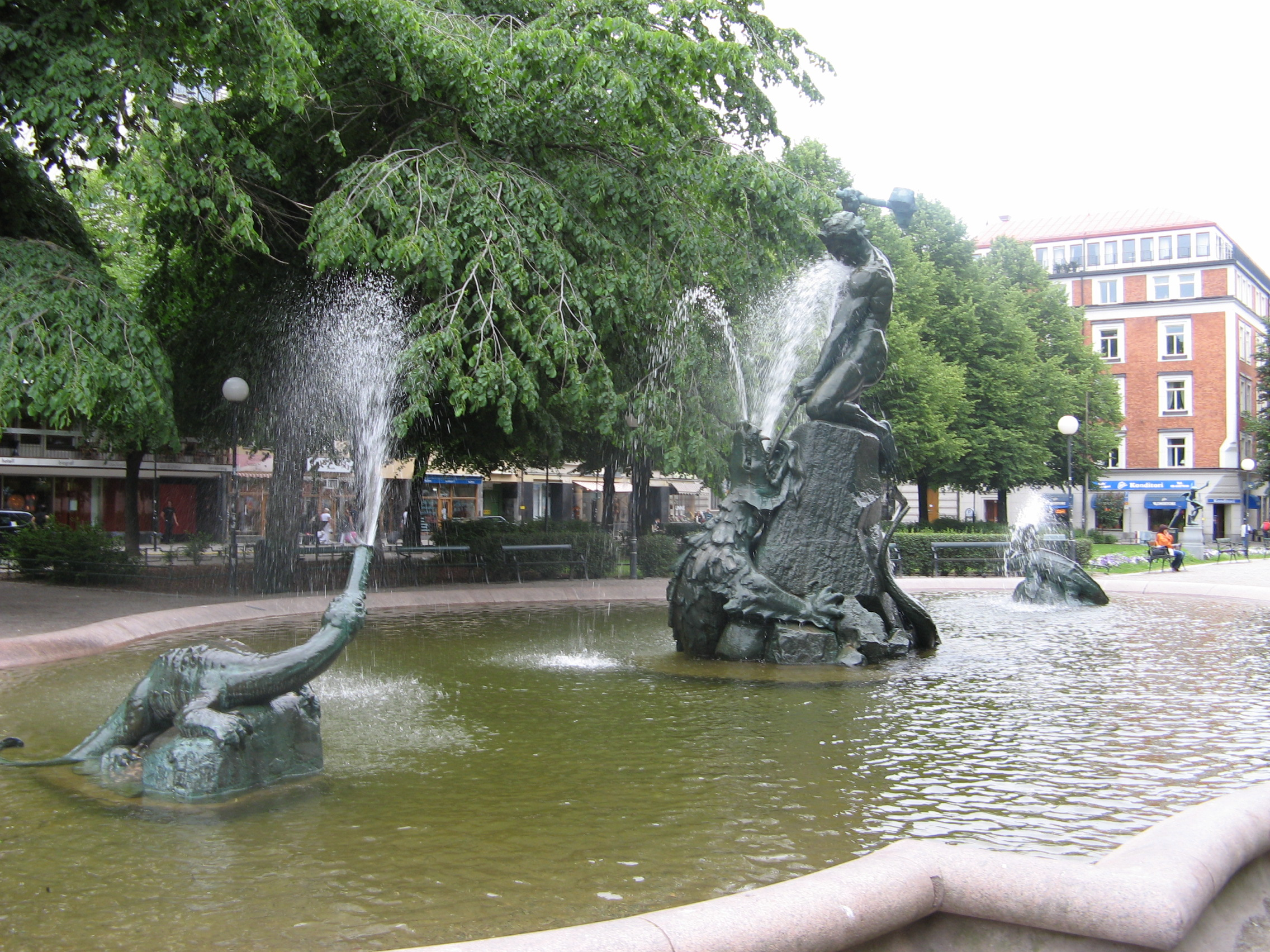 Mariatorget, Stockholm, Sverige.